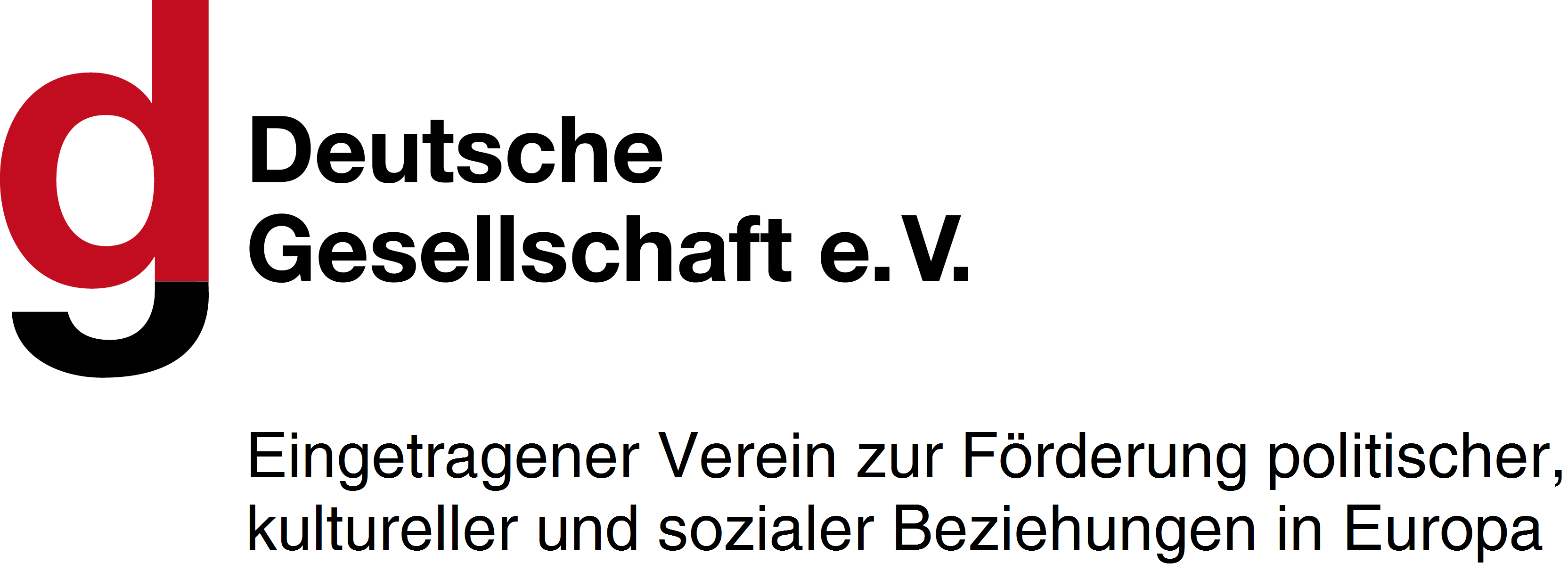 Logo von Deutsche Gesellschaft e.V.